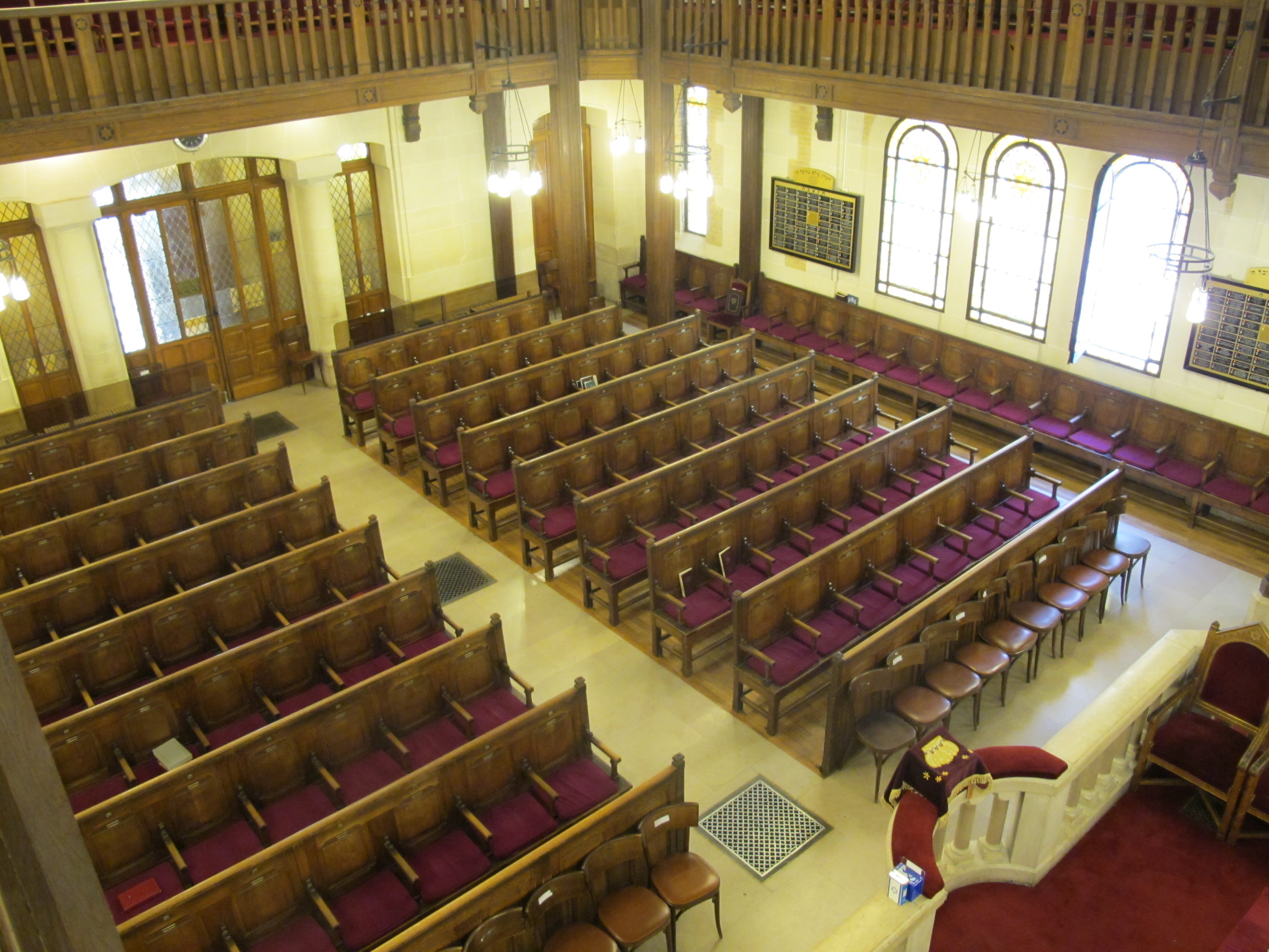 Synagogue Chasseloup-Laubat, Paris